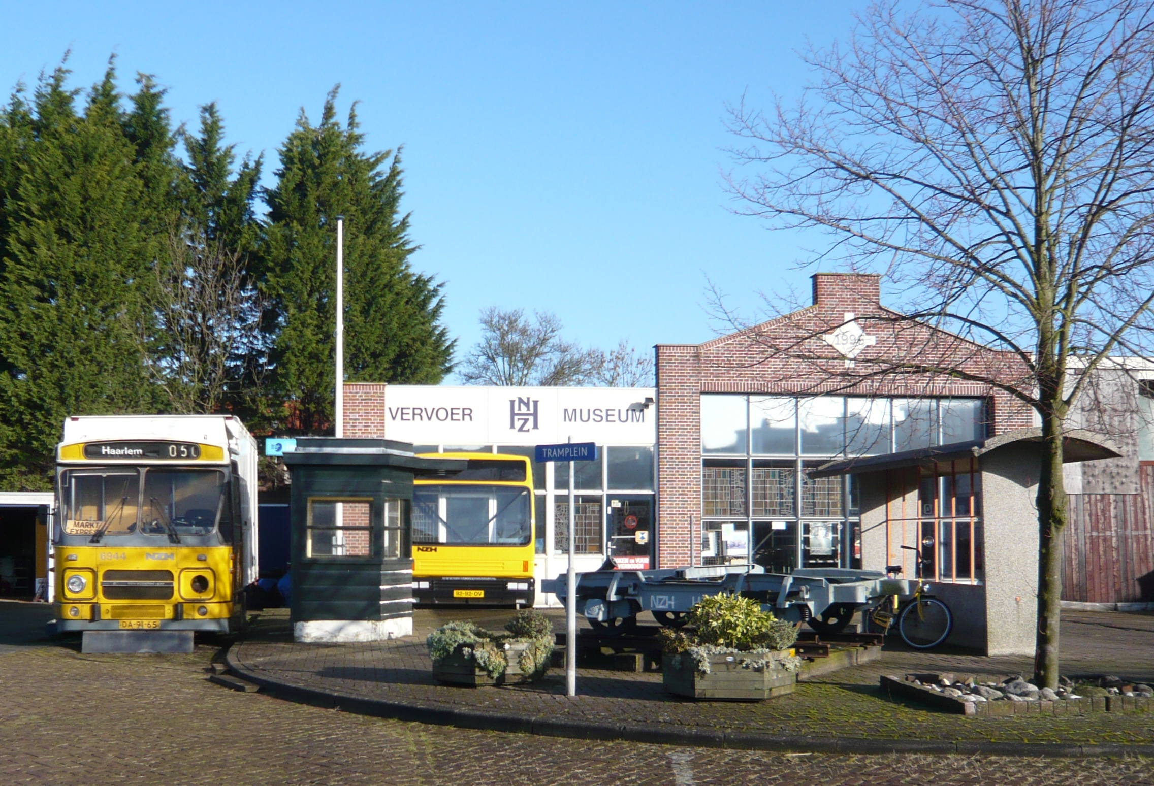 NZH Vervoer Museum, Leidsevaart 396, Haarlem